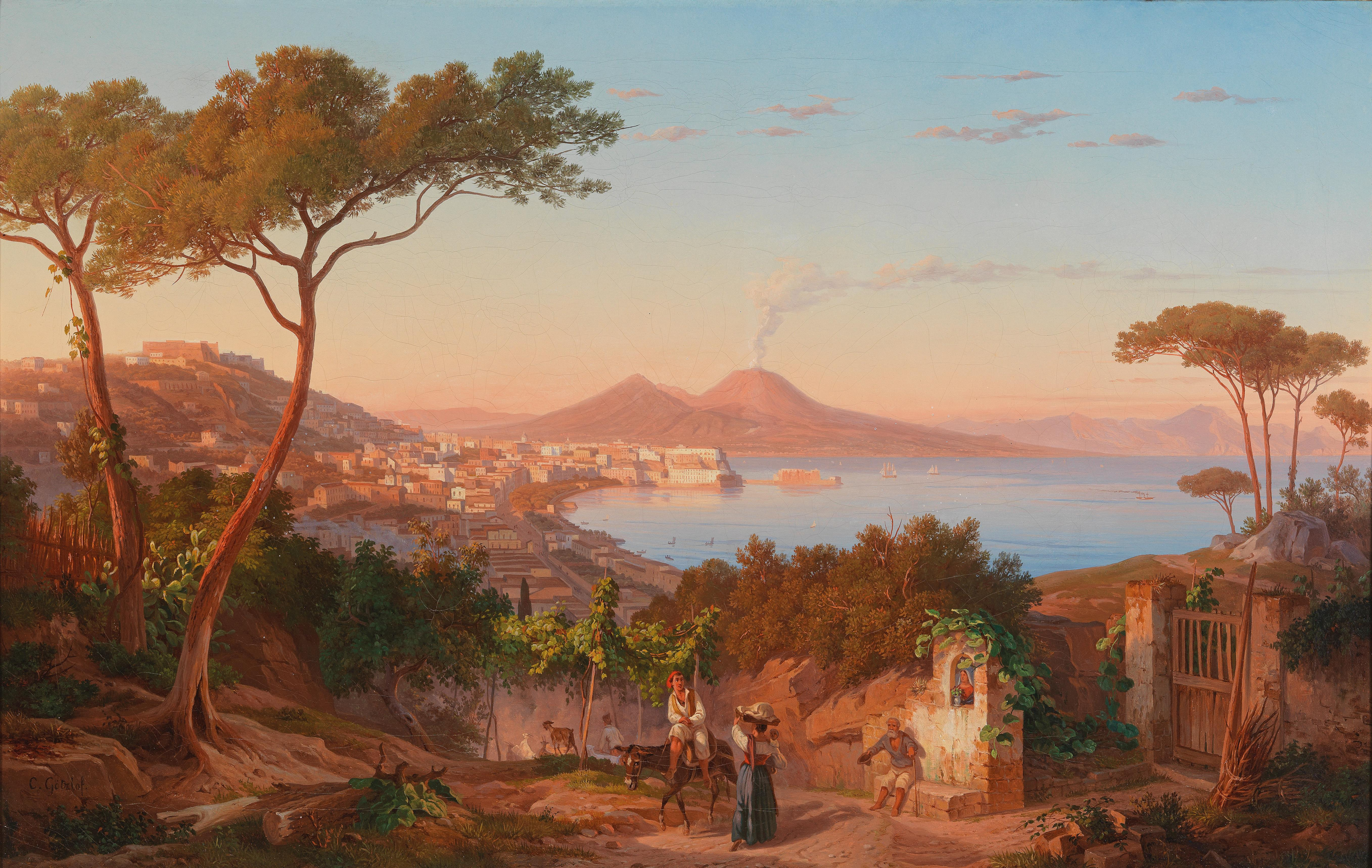 Blick in die Bucht von Neapel, im Hintergrund der Vesuv, signiert C. Götzlof, Öl auf Leinwand, 46,5 x 73,5 cm